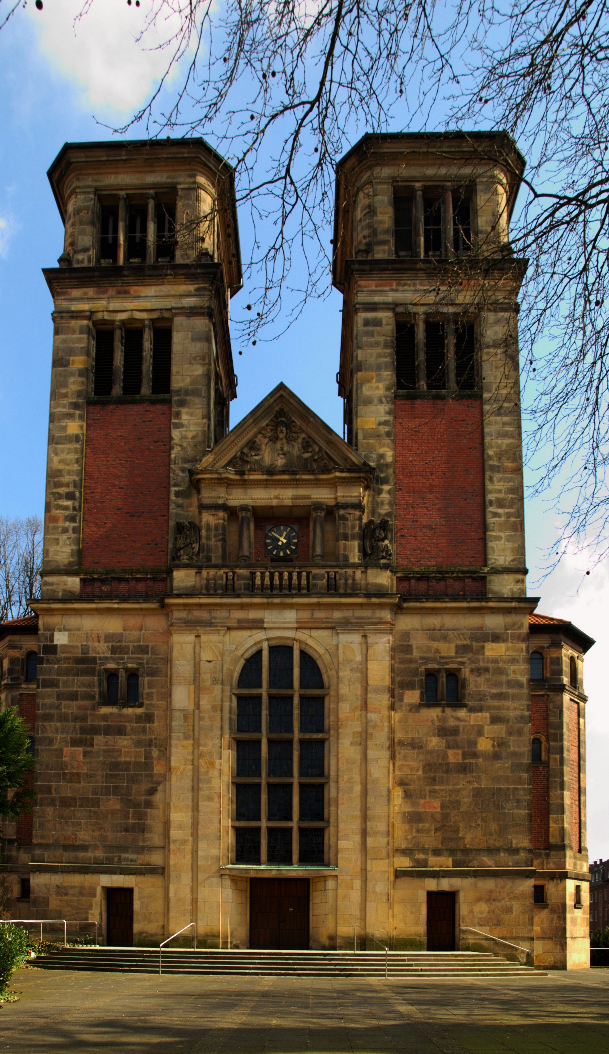 Katholische Antoniuskirche in Münster (Westfalen)